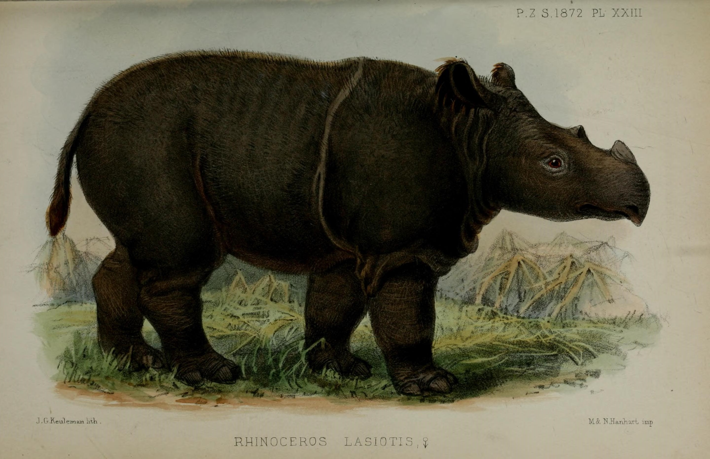 X X P-, oo CO IS! a. - i— i o . (-I CD o u